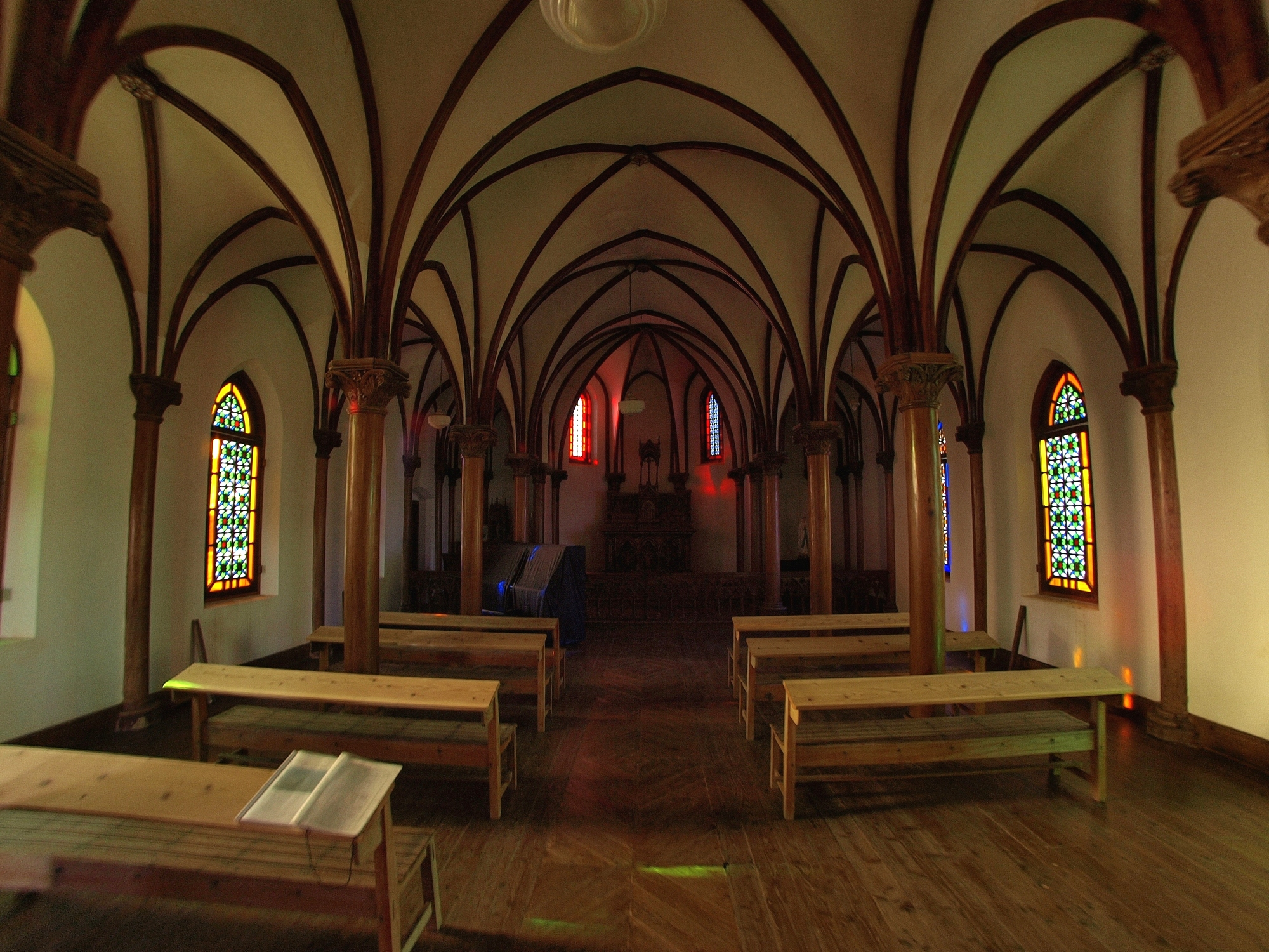 長崎県小値賀町野崎島、野首教会の内部。（許可を得て撮影）